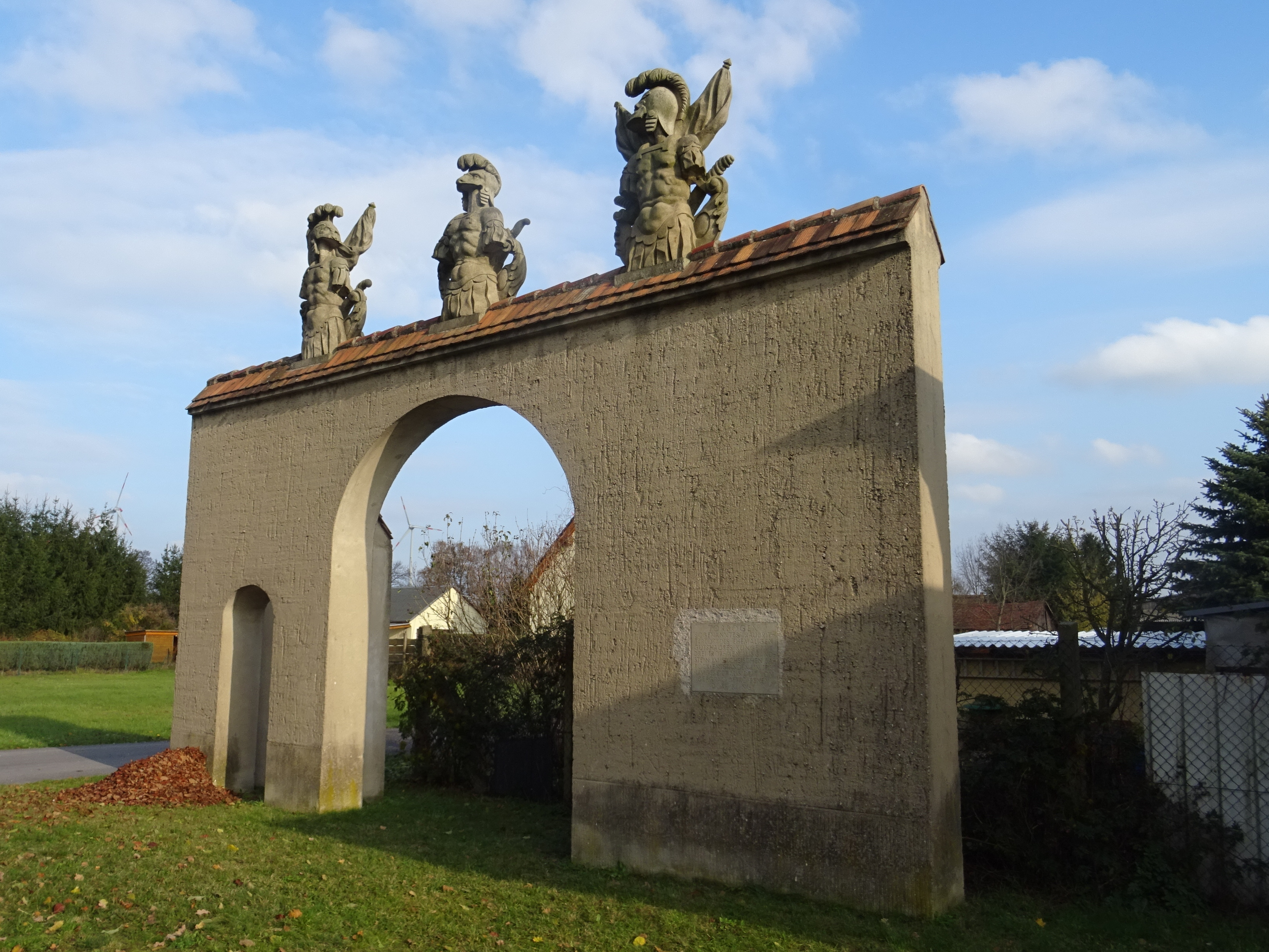 Raubrittertor, ursprünlich in Klinge, Kopie aufgestellt in Groß Schacksdorf